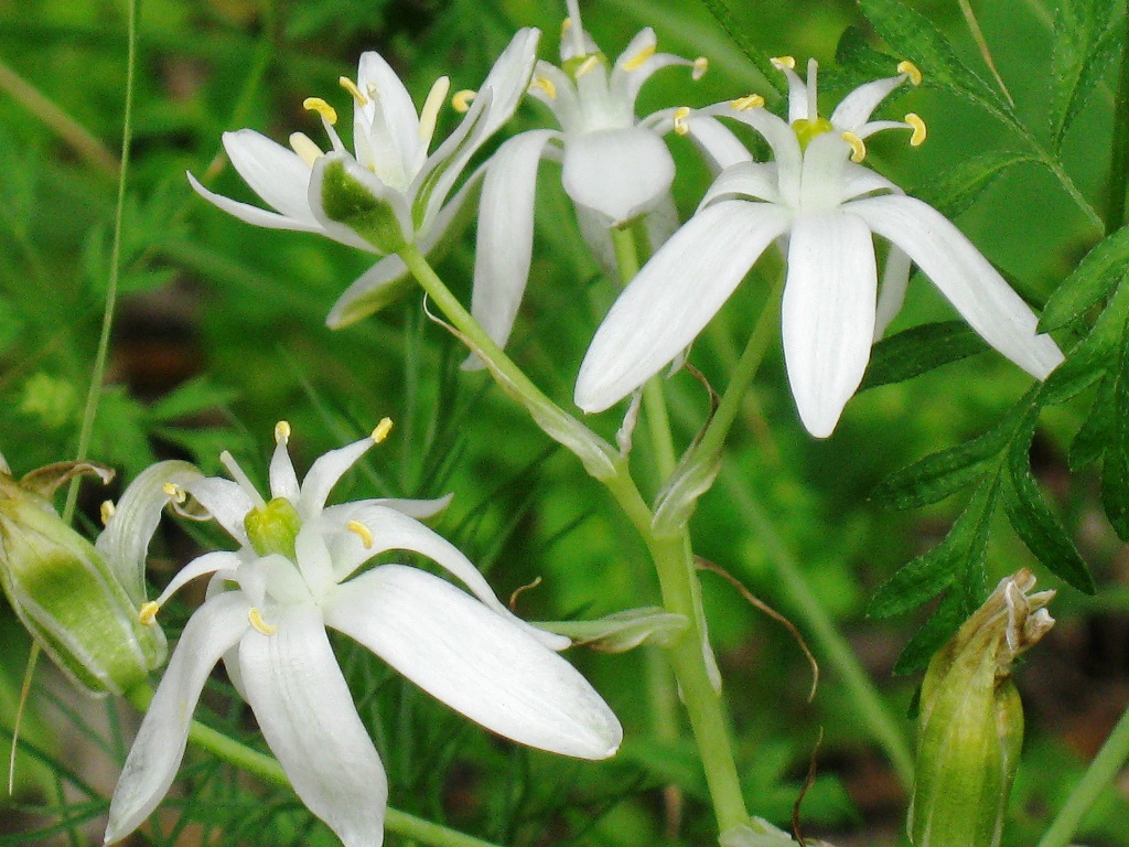 Ornithogalum_narbonense_from_Kedumim רישיון נוצר על ידי משתמש:Daniel Ventura